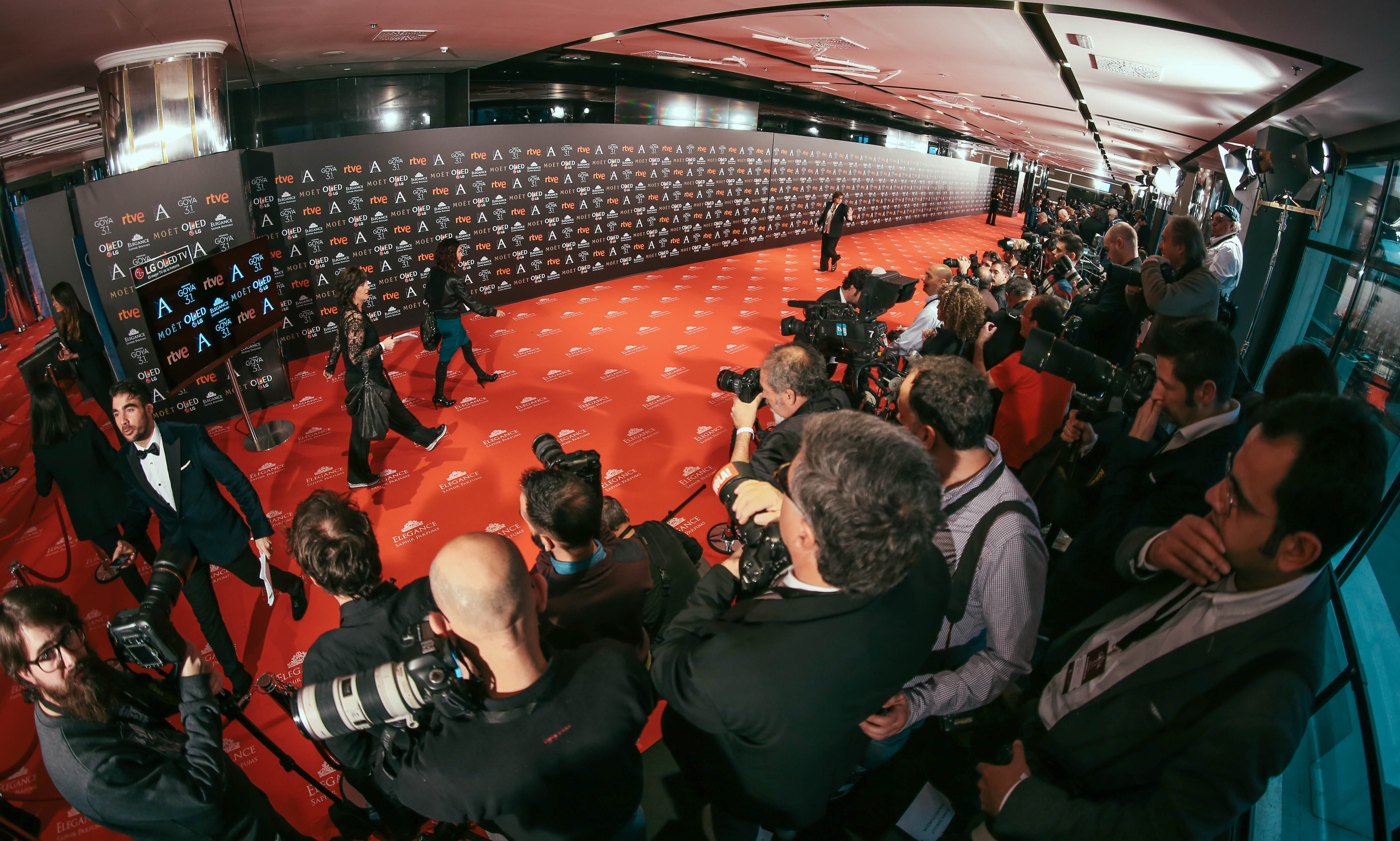 Alfombra Roja de los Premios Goya 2017